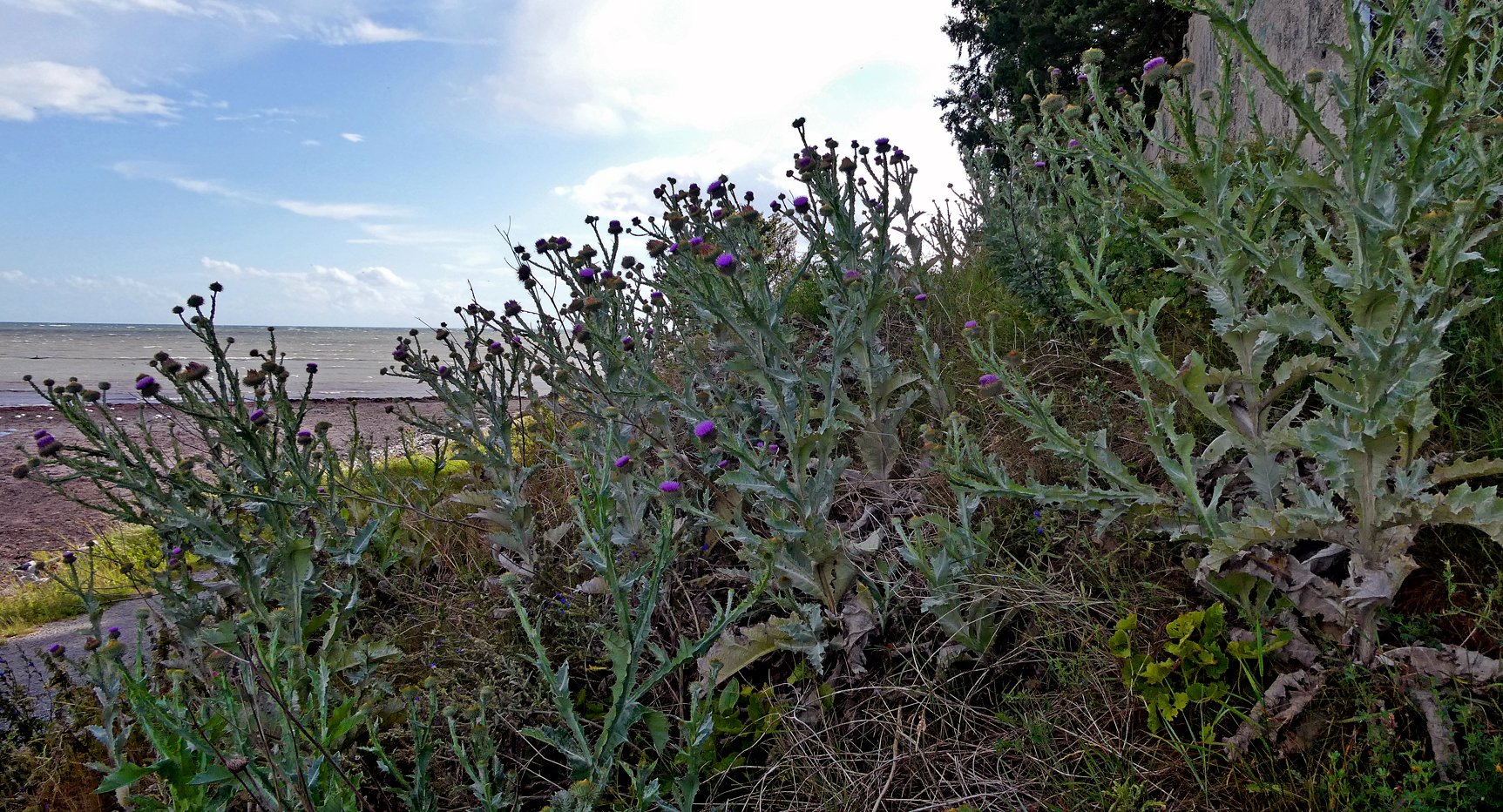 En slänt med blommande Ulltistel vid "Världens ände" i Ystad 6 juli 2020.